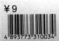 caricato su wiki da User:Intsokzen con lo stesso nome e la seguente descrizione Chinese bar code, CNY9.